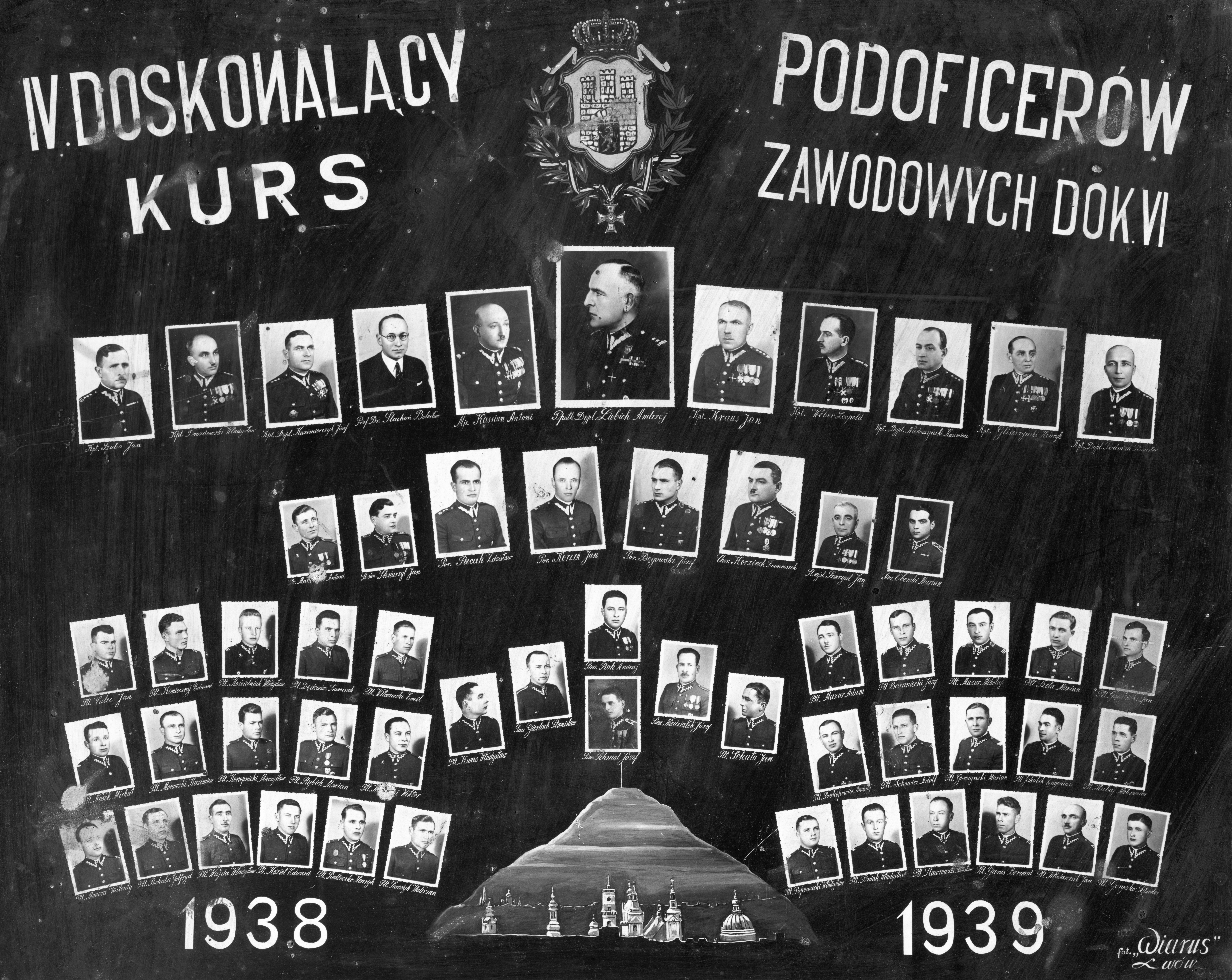 Zasoby rodzinne. IV Kurs doskonalący. 1938-1939